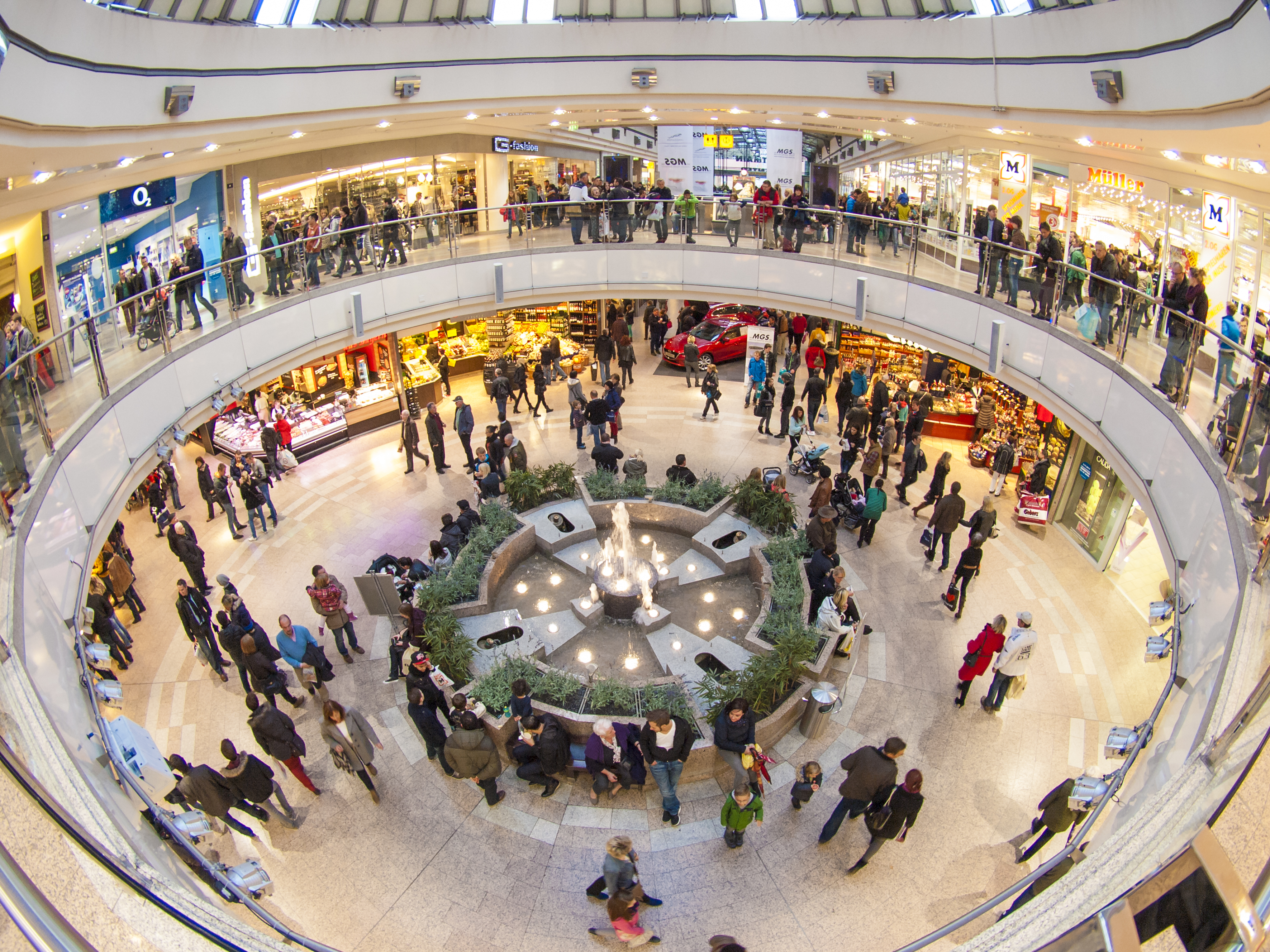 Rondell im Rotmain-Center mit Brunnen